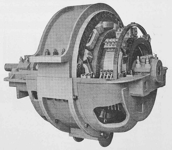 MFO-Lokomotive Nr. 1 und 2: Fahrmotor